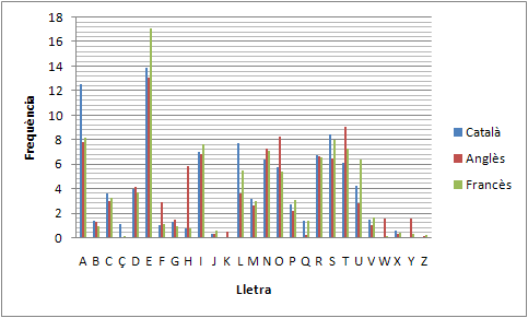 Frequència de les lletres en els textos en català, anglès i francès